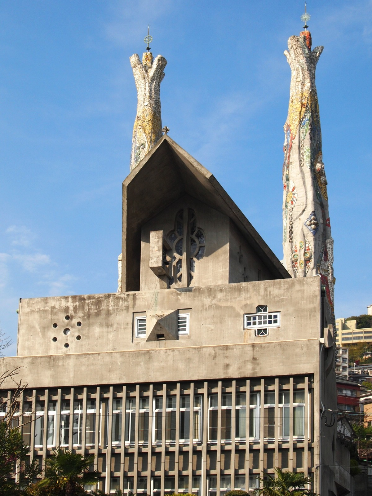 長崎市にある西坂教会。